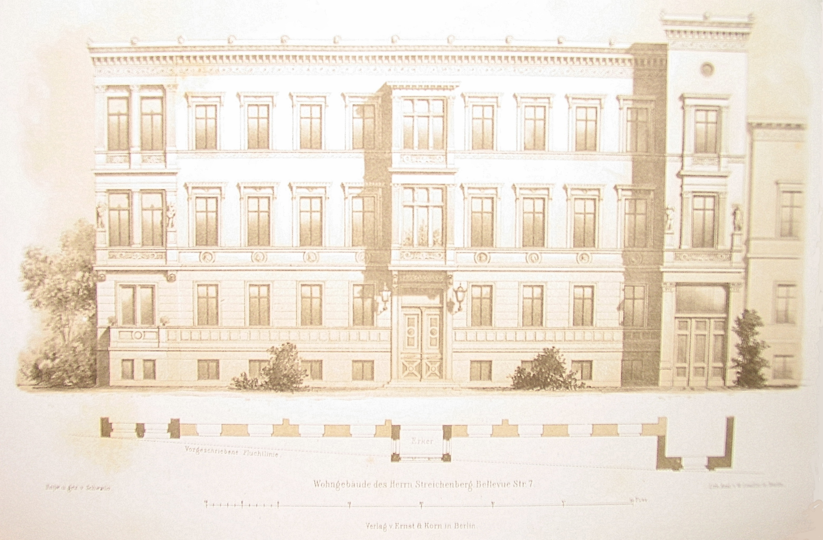 Mehrfamilienwohnhaus Streichenberg in Berlin-Tiergarten, Bellvuestraße 7; erbaut vor 1862 nach Entwurf des Architekten Carl Schwatlo; im Zweiten Weltkrieg zerstört